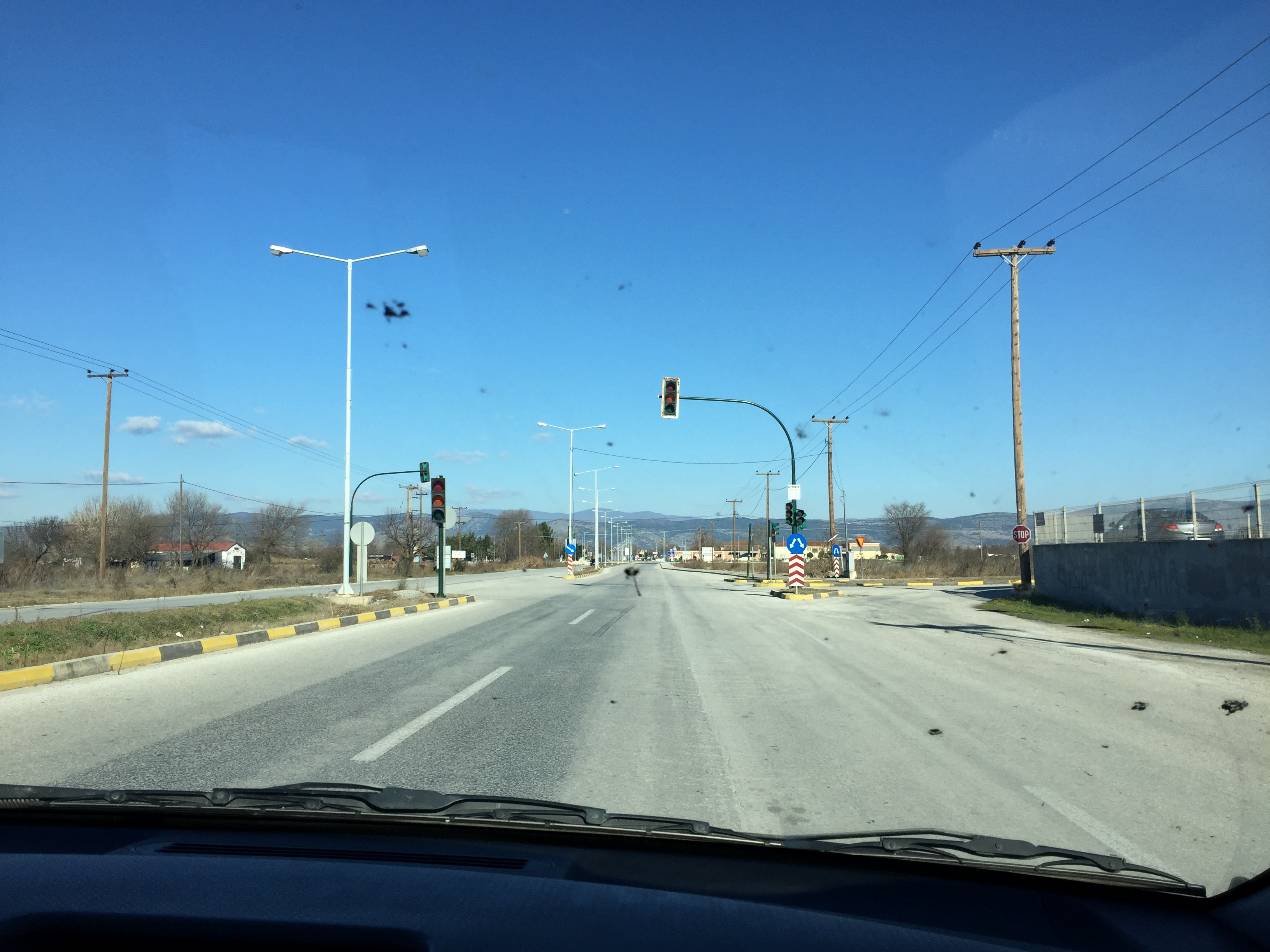 Ο κόμβος ΚΤΕΛ Α της Περιφερειακής Οδού Τρικάλων